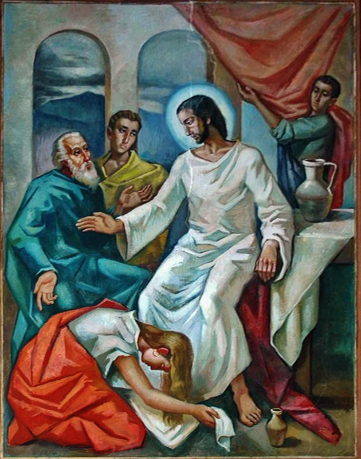 Església de Santa Magdalena, Esplugues